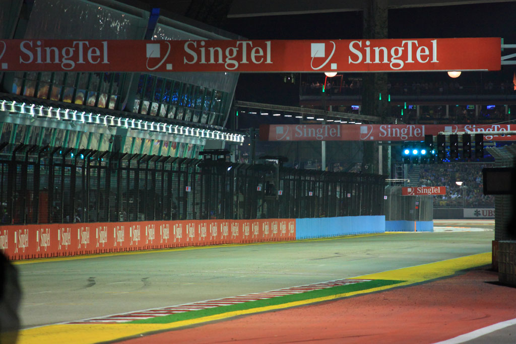 Formula 1 シンガポールGP